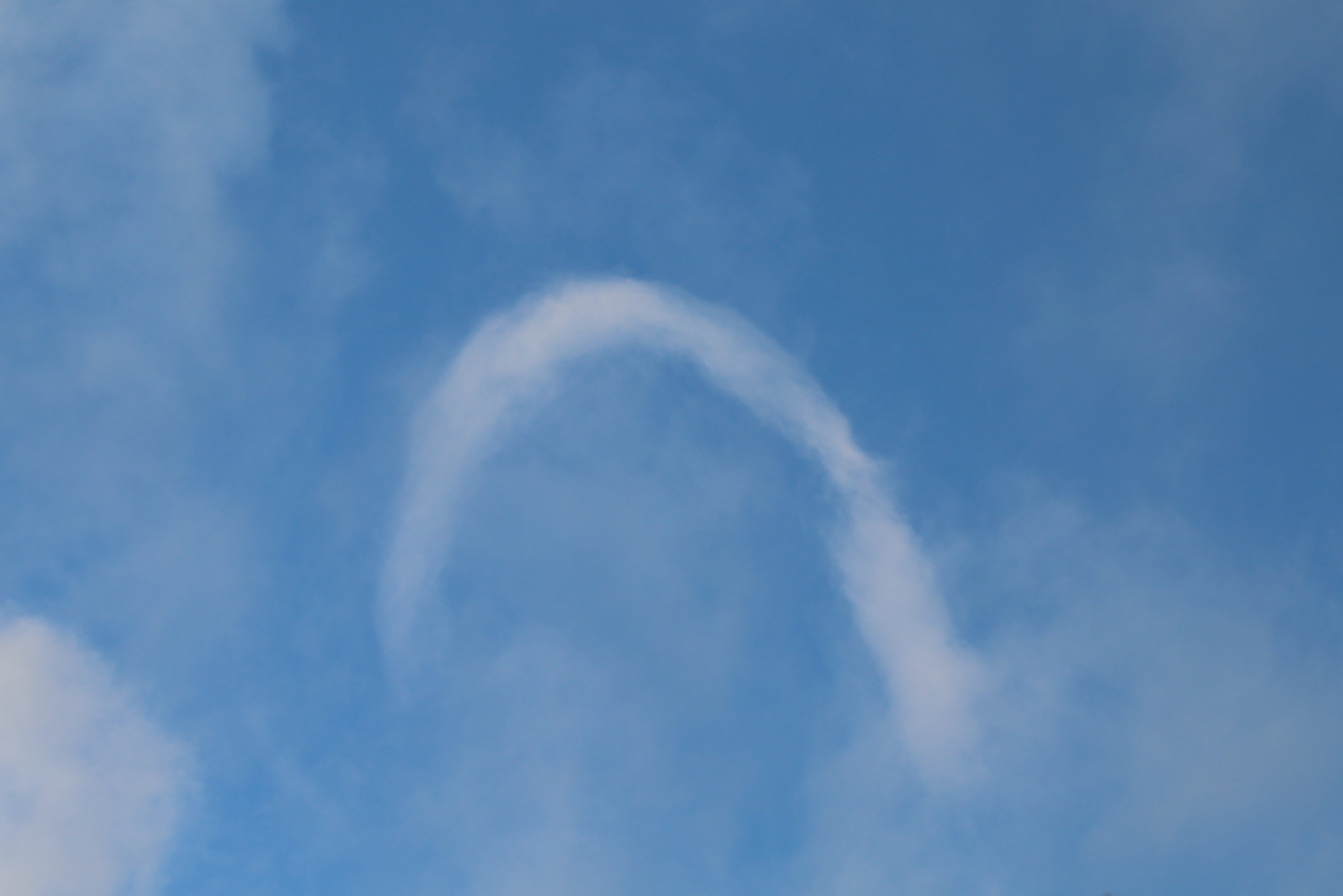 Hufeisenwirbel, auch genannt Horseshoe Vortex, eingebettet in tiefes Cumulus-Gewölk